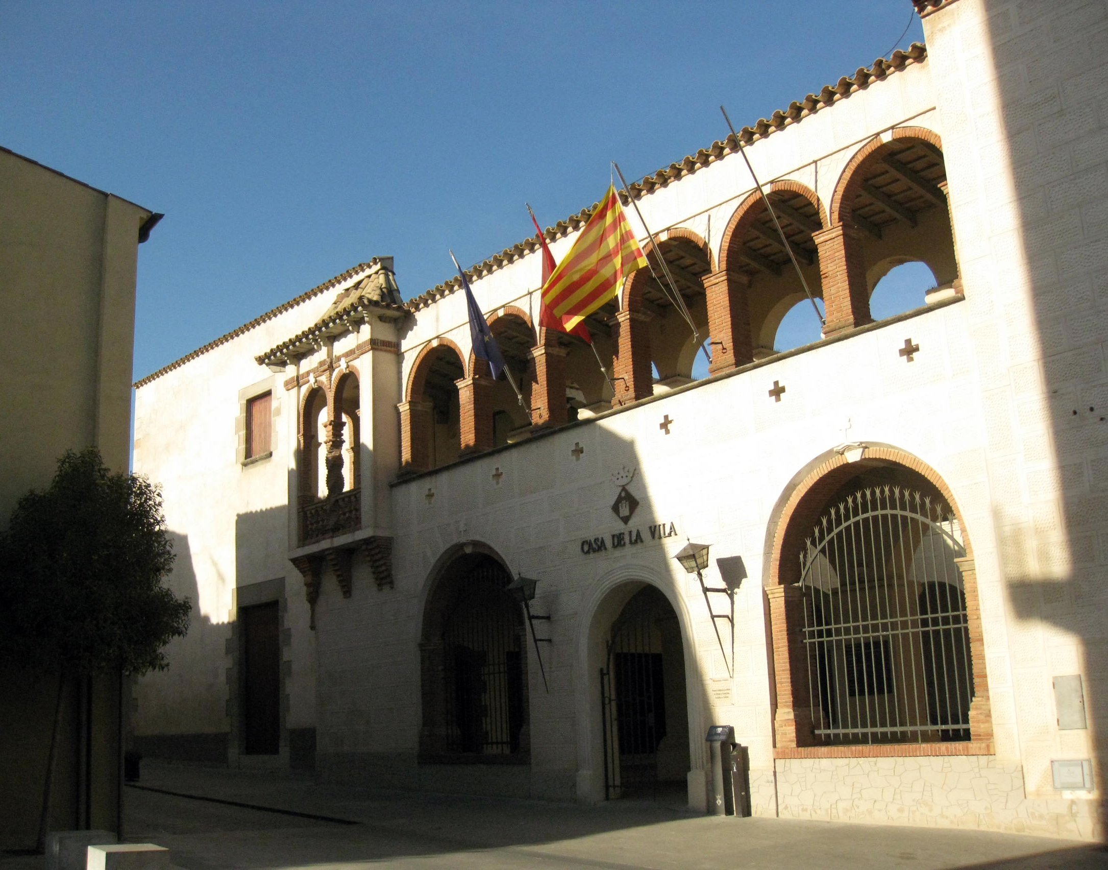 Casa de la Vila (Hostalric) Object location41° 44′ 45.1″ N, 2° 38′ 28.87″ E